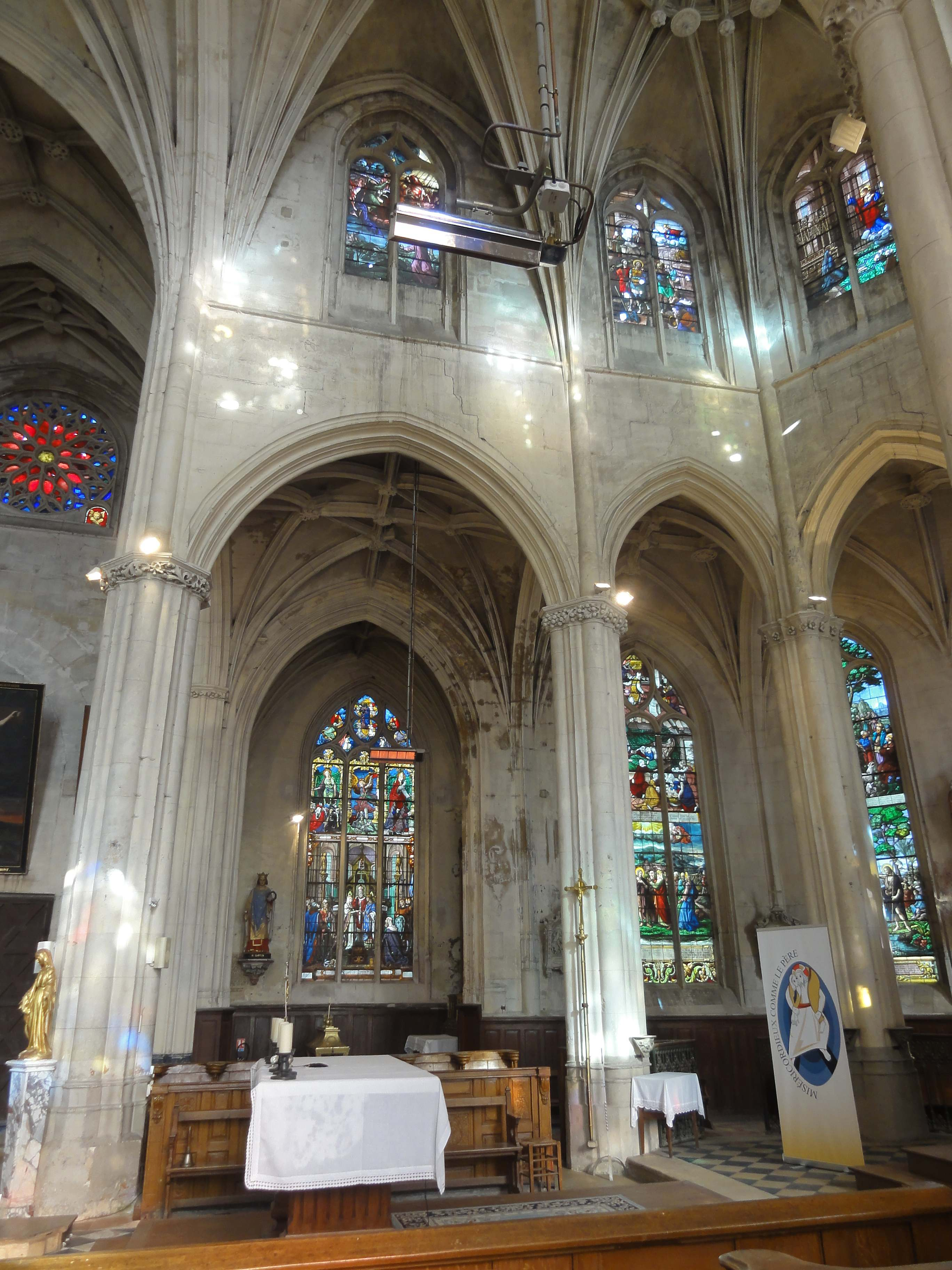 Intérieur de l'église - voir titre.